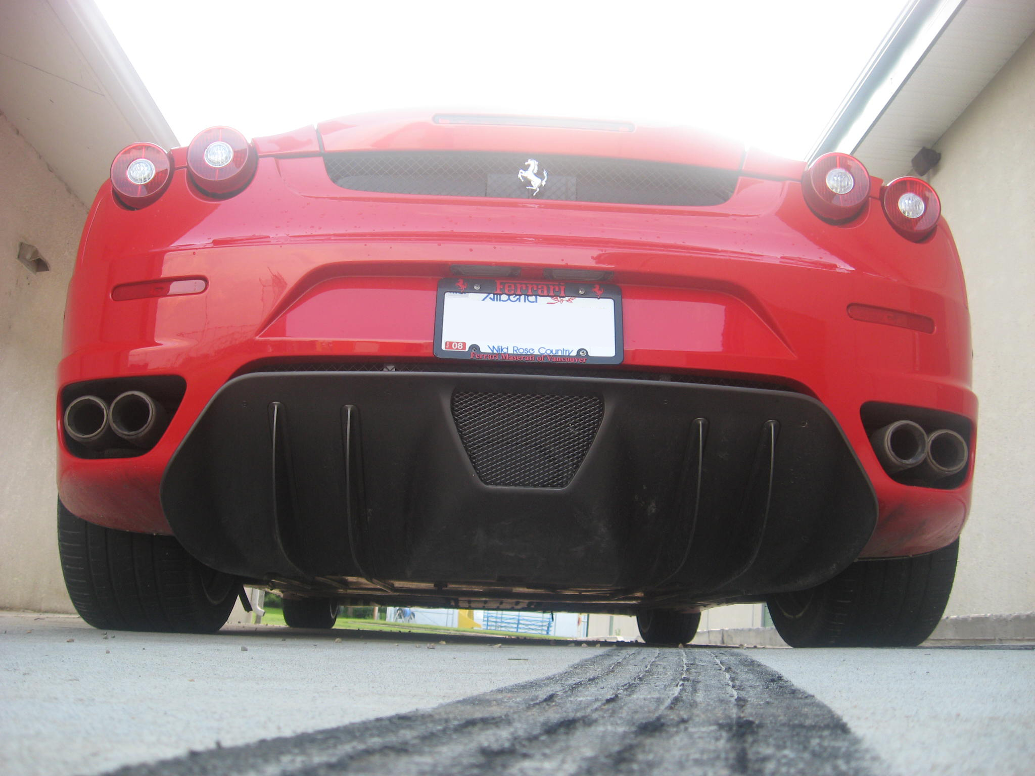 Ferrari F430 Diffuser